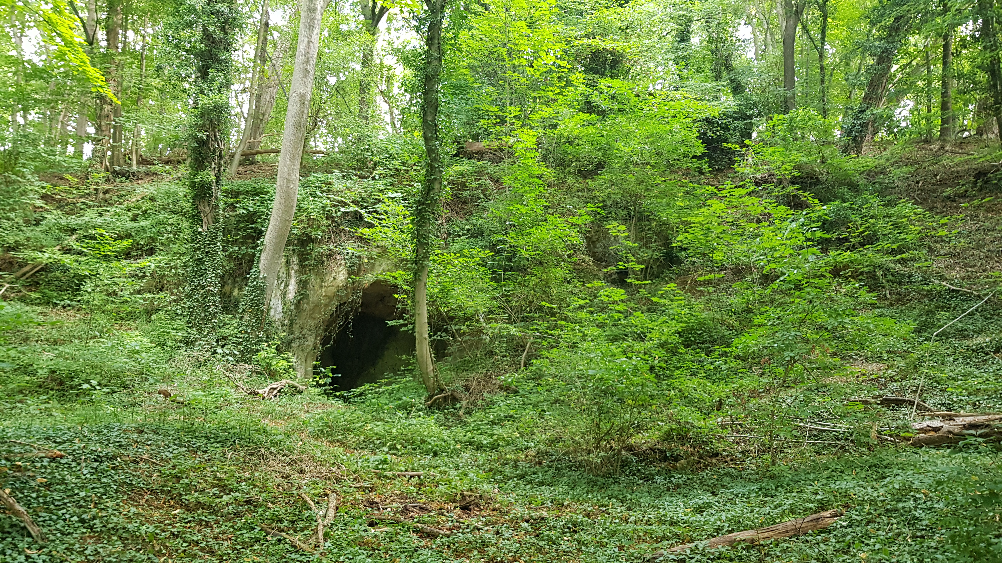 Abri van Rijckholt in Savelsbos, Rijckholt, Nederland